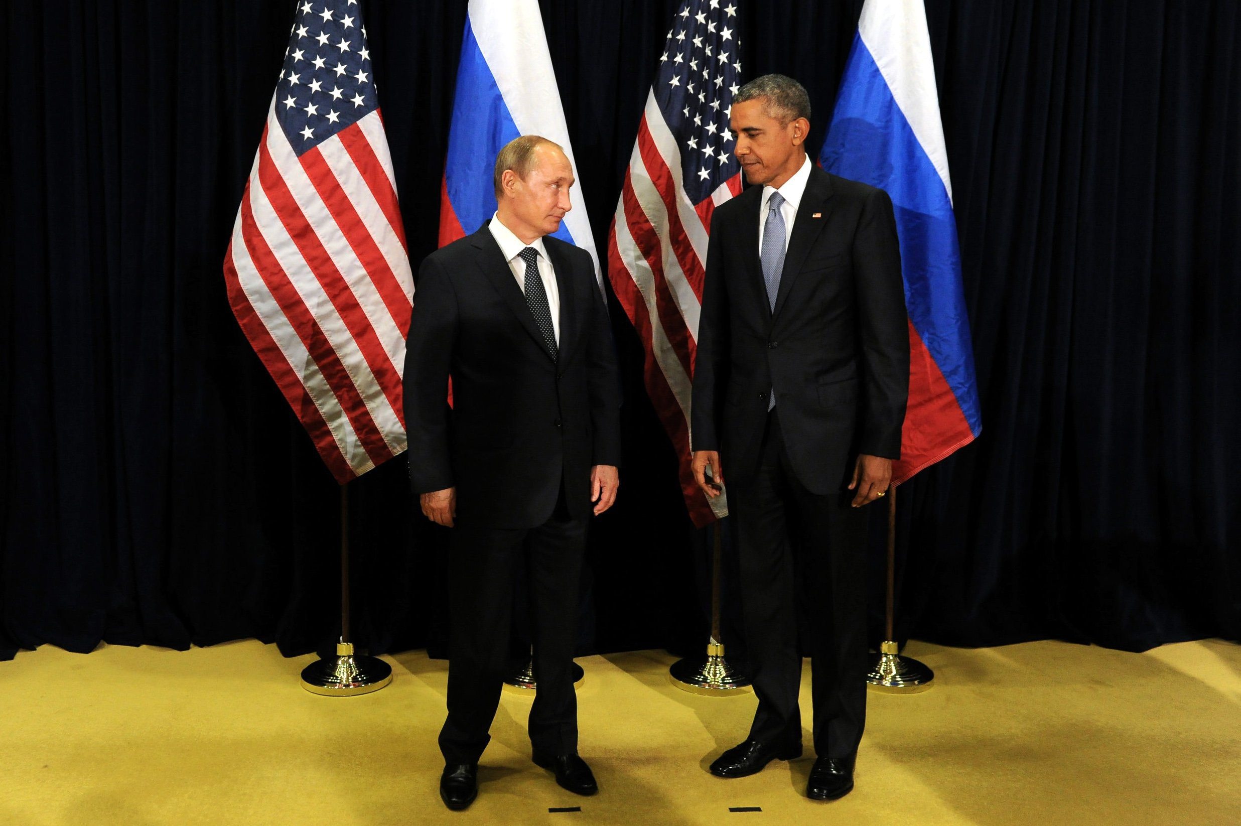 Президент России Владимир Путин с Президентом США Бараком Обамой